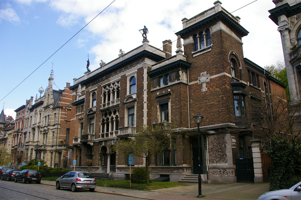 Cogels-Osylei 67–69, Zurenborg area of Antwerp, arch.Frans Van Dijk